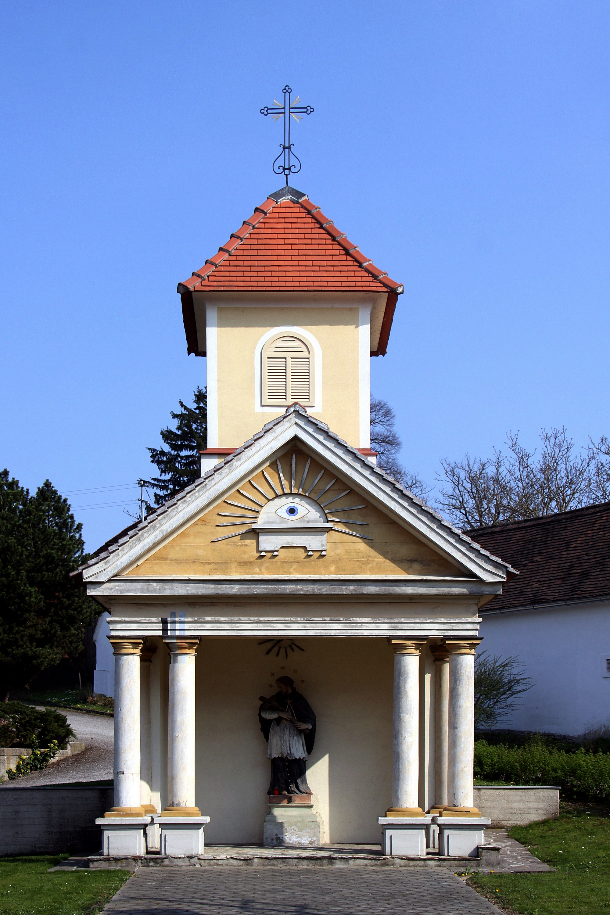 Kohfidisch - Figur Johannes Nepomuk Object location47° 10′ 29.38″ N, 16° 21′ 29.21″ E